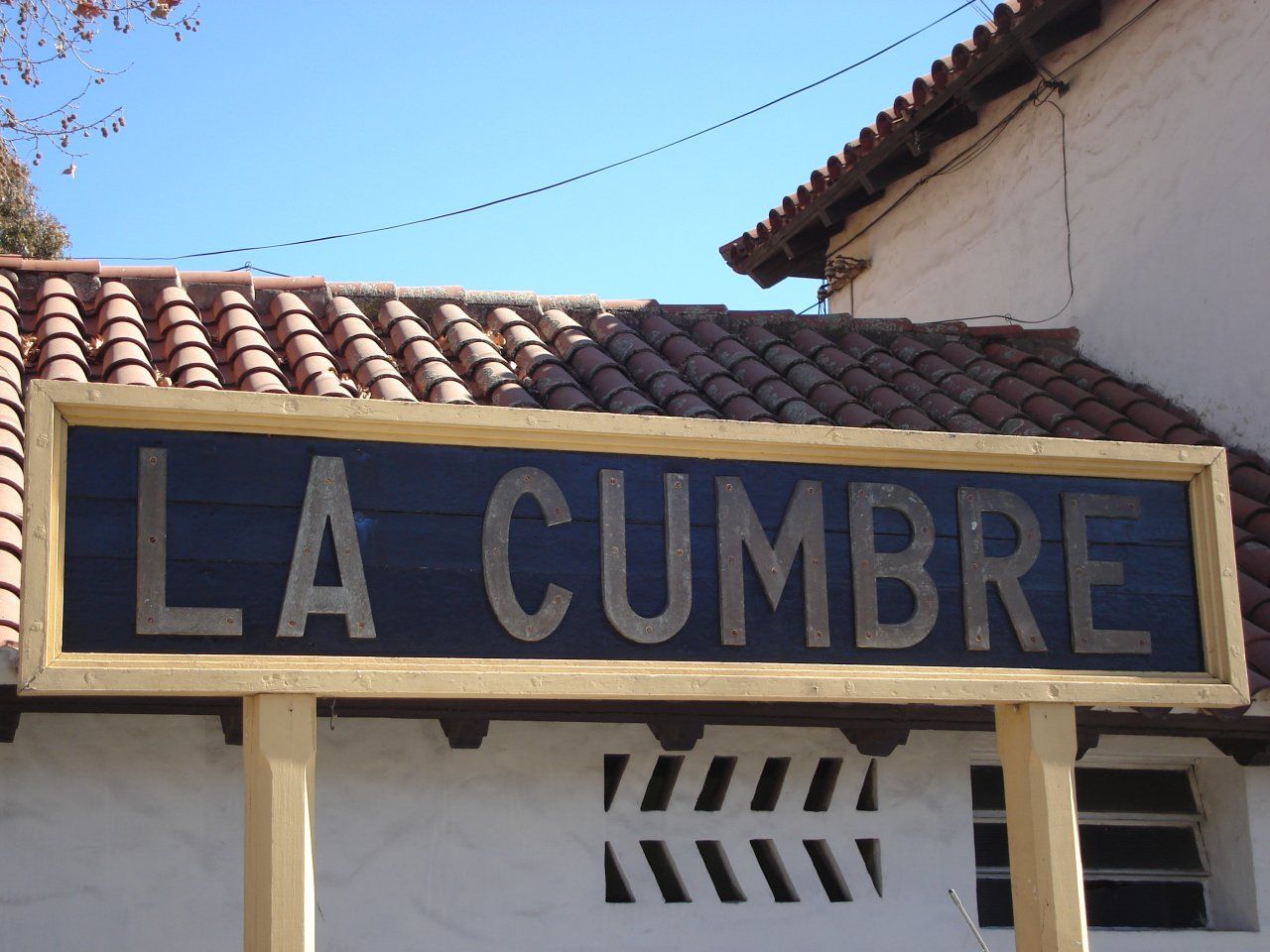 Cartel nomenclador de la estación La Cumbre del Ferrocarril General Belgrano en la ciudad homónima, departamento Punilla, provincia de Córdoba, Argentina.